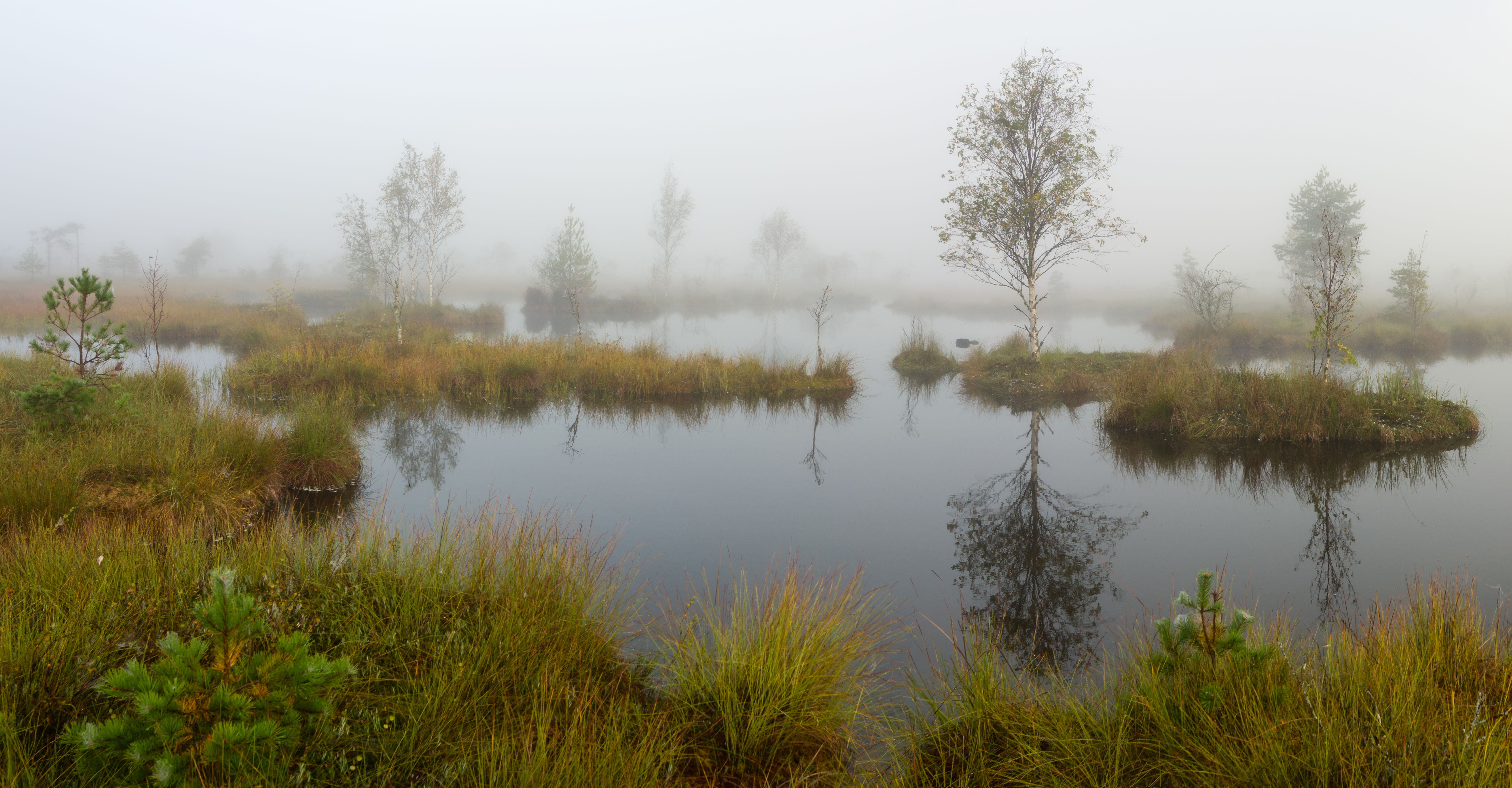 Jalase maastikukaitseala. Pilt tehtud 2013. aasta septembri algul ühel hästi udusel hommikul Sõbessoos. Sõbessoo on kaitseala üks osa.